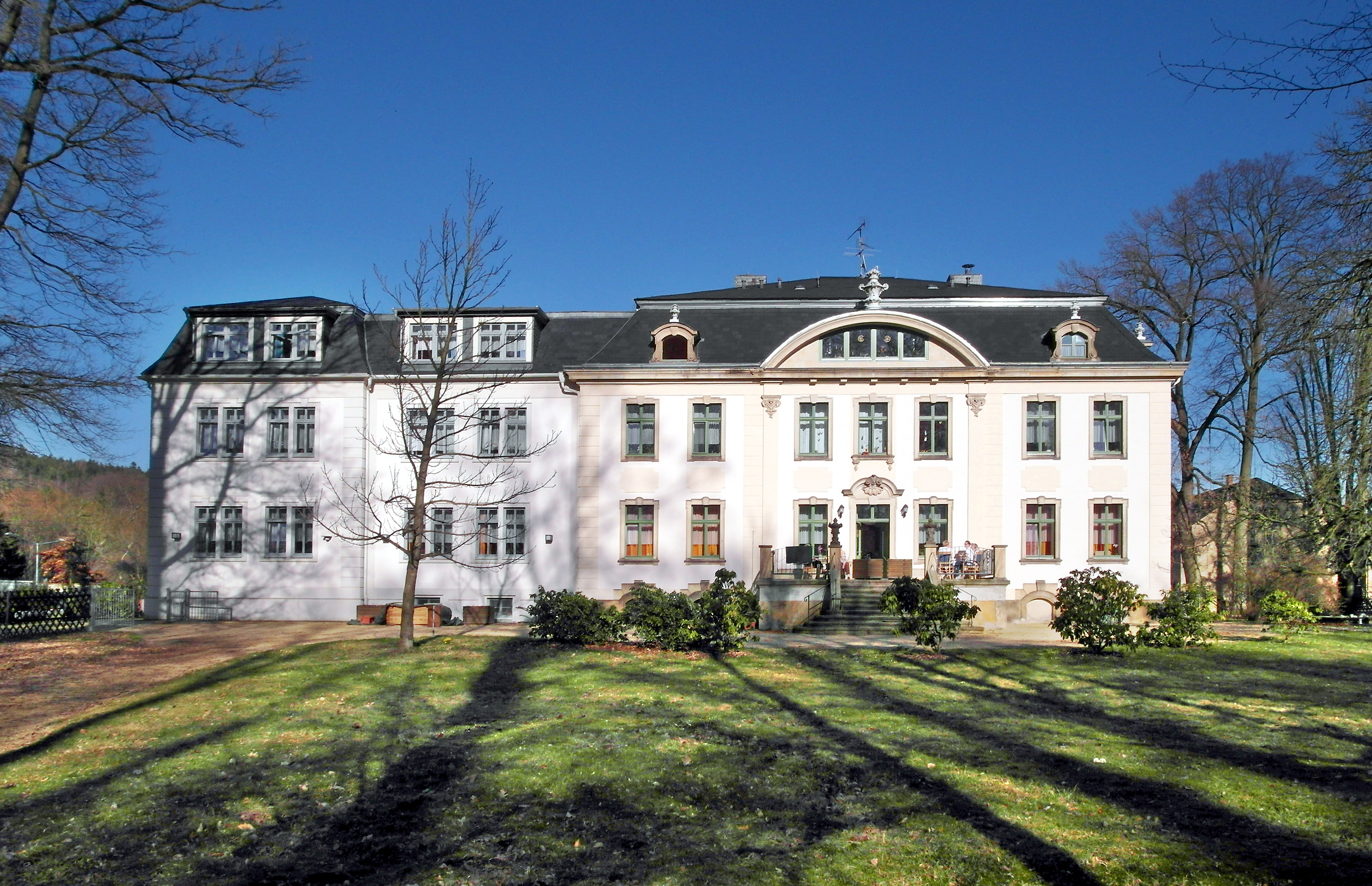 27.03.2017 02742 Friedersdorf (Neusalza-Spremberg) Am Pflegeheim 4: Schloß Friedersdorf, heute Seniorenheim ASB-Pflegeheim. Auf dem Niederfriedersdorfer Gut von 1887-89 unter Hans Leo von Oppell nach Plänen des Architekt Heinrich Schubert erbaut. In der DDR war es bis 1957 Schulungsheim der CDU und seit 1961 Altersheim. Seit der Wende führt der Arbeiter-Samariter-Bund Löbau das Seniorenheim. Sicht aus dem Park von Südwesten. [SAM9030.JPG]20170327530DR.JPG(c)Blobelt